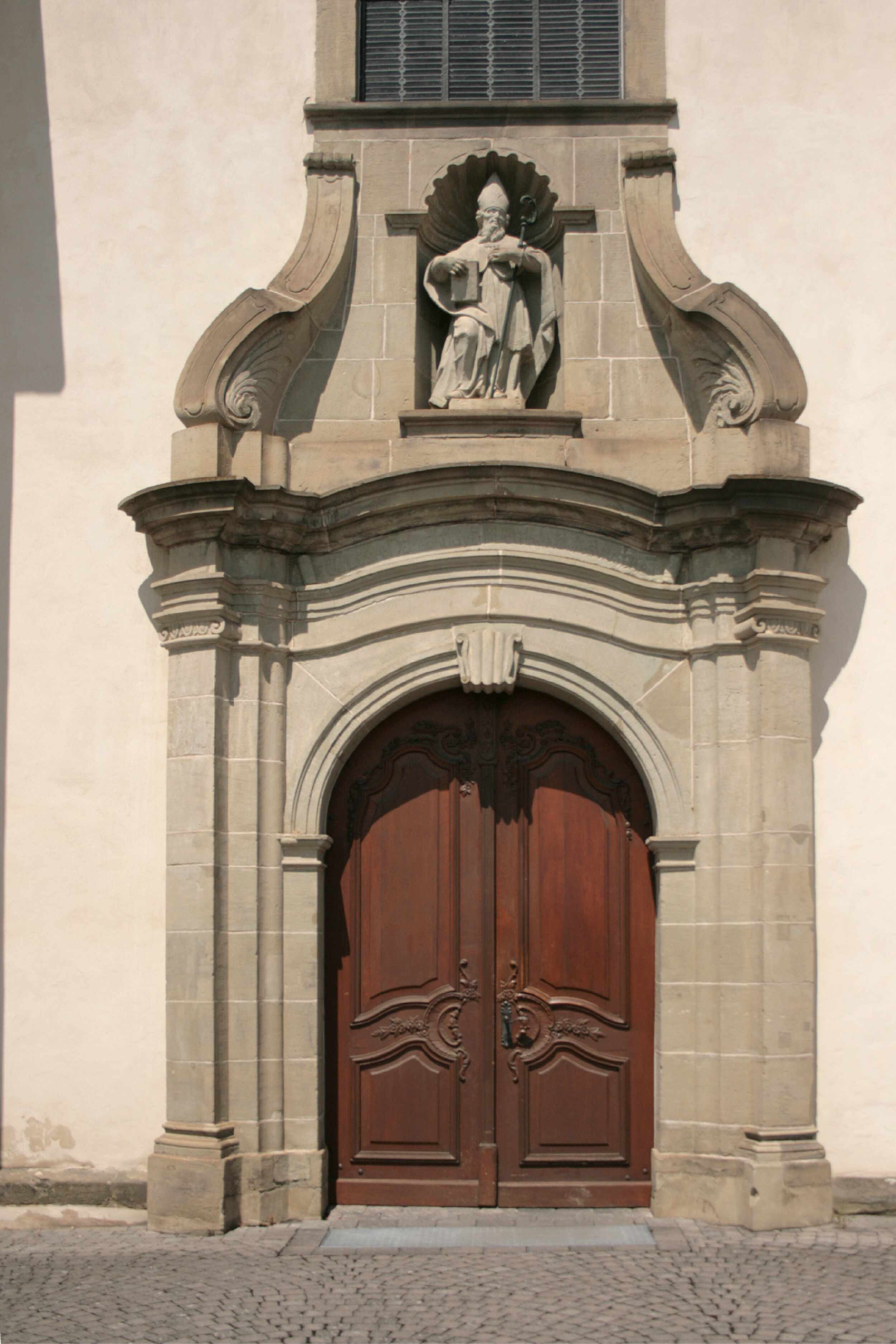 Beschreibung: Eingangsportal Kirche St. Martin in Bigge Quelle: Eigenes Foto Urheber: Wolfgang Poguntke Aufnahmedatum : 13.07.2008